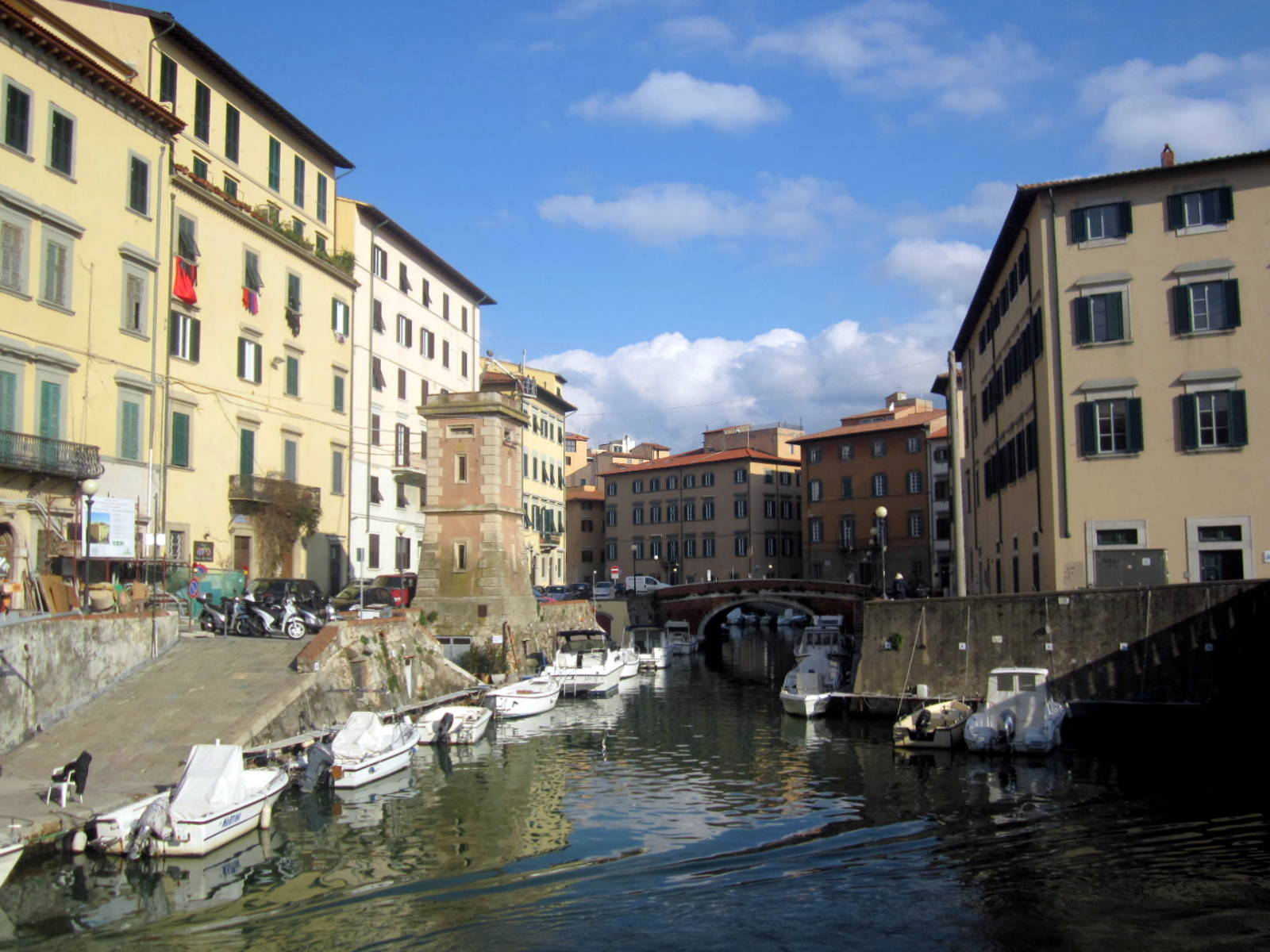 Quartiere della Venezia Nuova a Livorno